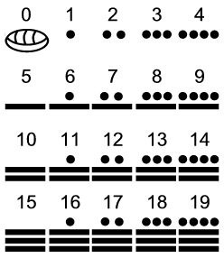 Grafisch vereinfachtes Zahlensystem der Mayas